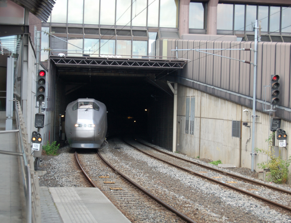 Oslotunnelen seen from Oslo S with Flytoget comming from tunnel